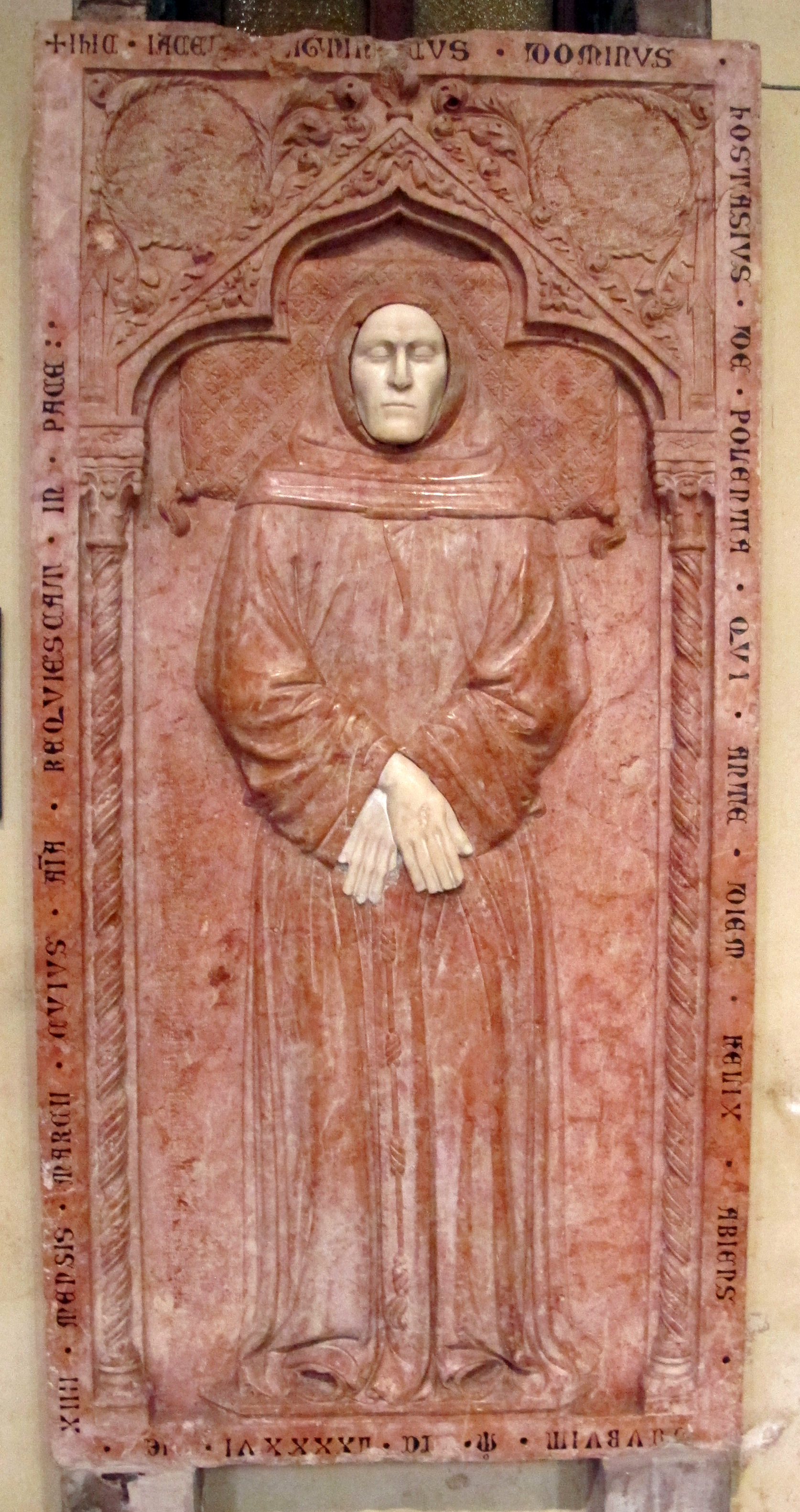 Chiesa di San Francesco a Ravenna, interno. Lapide di Ostasio II da Polenta (1396), in marmo rosso di Verona.